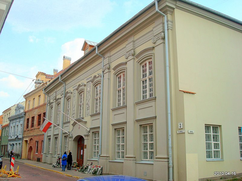 Дворец Пацов